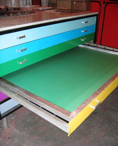 Trocknungsofen